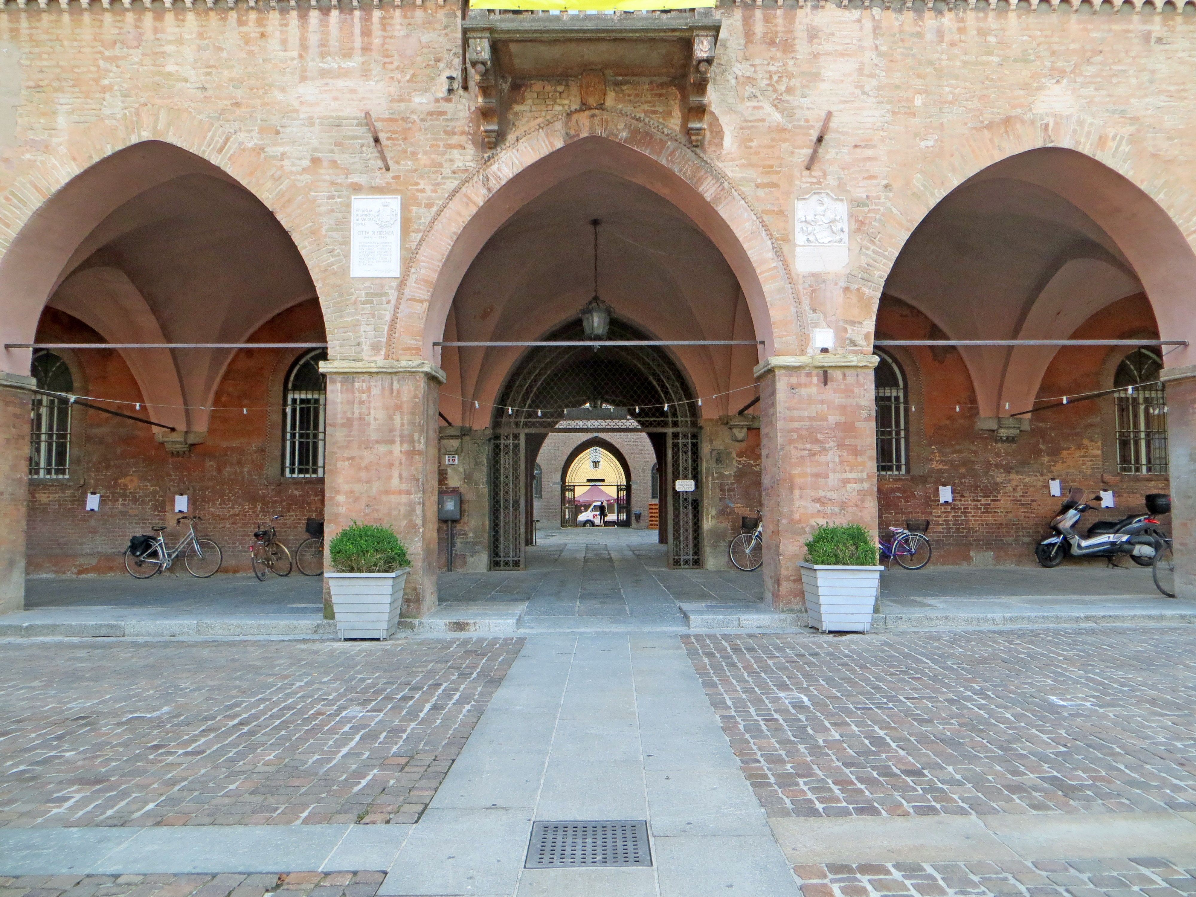 Palazzo Comunale (Fidenza) - porticato